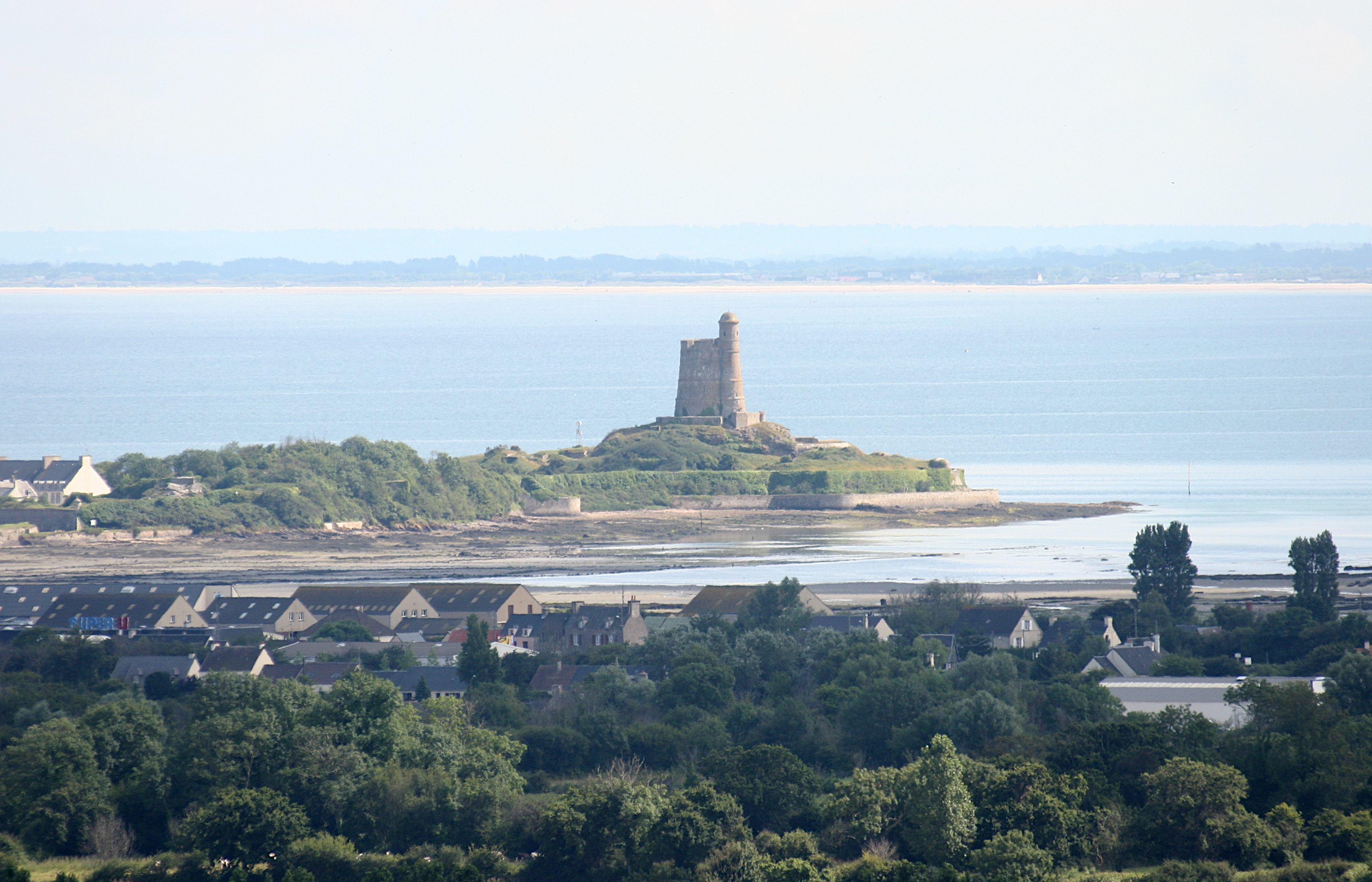 Vue générale du fort de la Hougue à Saint-Vaast la Hougue, Manche, France